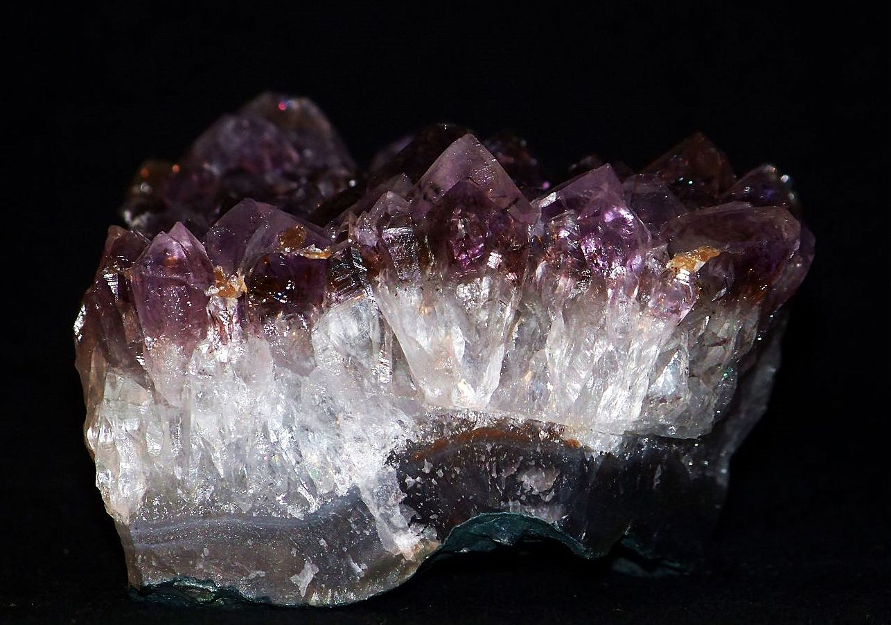 Szczotka ametystowa, można zauważyć w powiększeniu inkluzje rutylu, na wzór "włosów wenus". Pochodzenie - Minas Gerias, Brazylia.